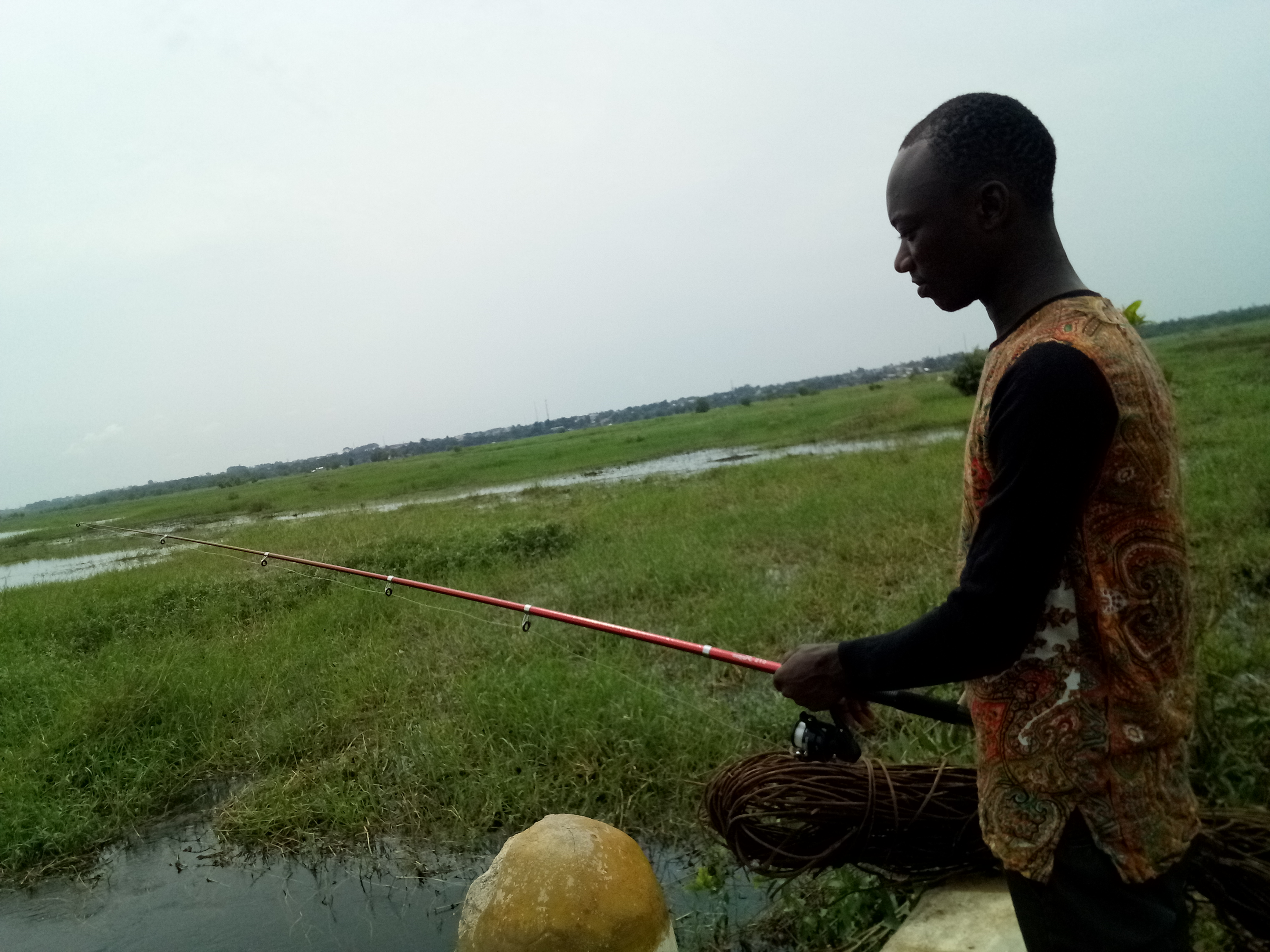 Pêche dans les marais de SO-AVA This is an image with the theme "Play" from: Benin